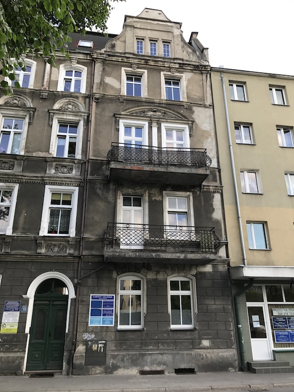 Kamienica przy ul. Wojska Polskiego 13 w Raciborzu